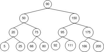 Қазақша (кирил): Екілік кодта Бинарлық іздеу формасы